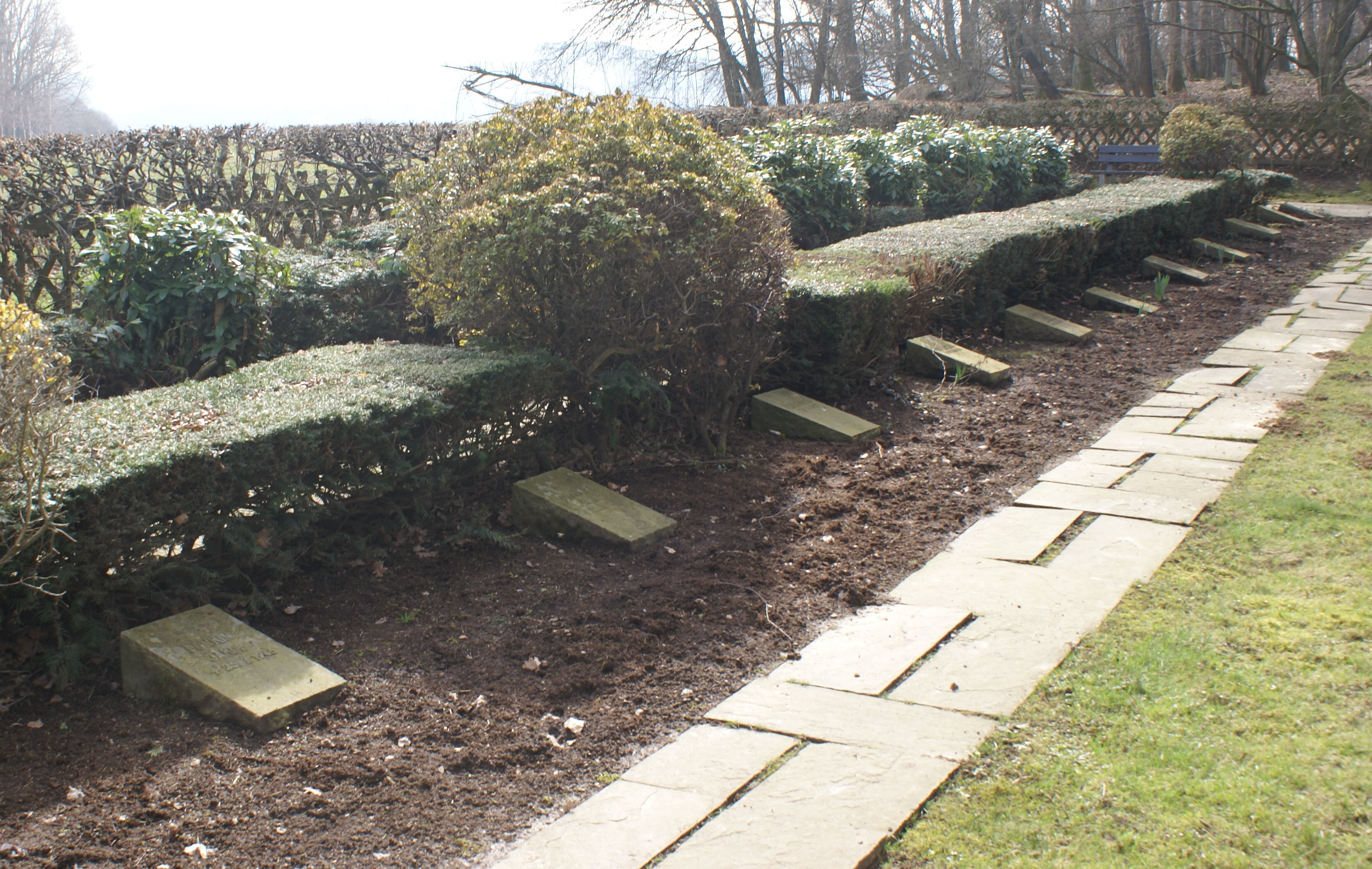 Kriegsgräberstätte Duloh des Stammlagers VI A in Hemer